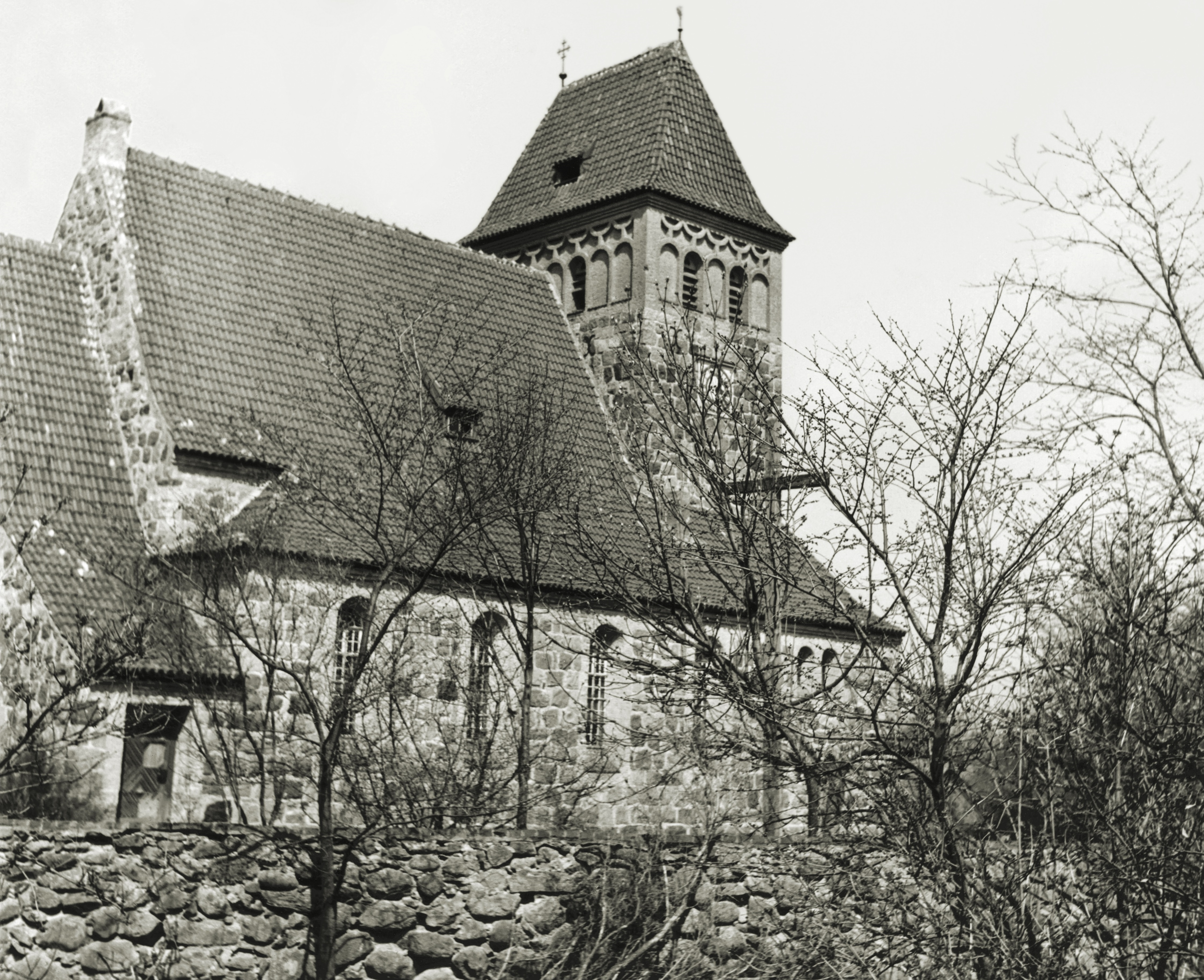 Kirche in Kallinowen / Kalinowo, Masuren